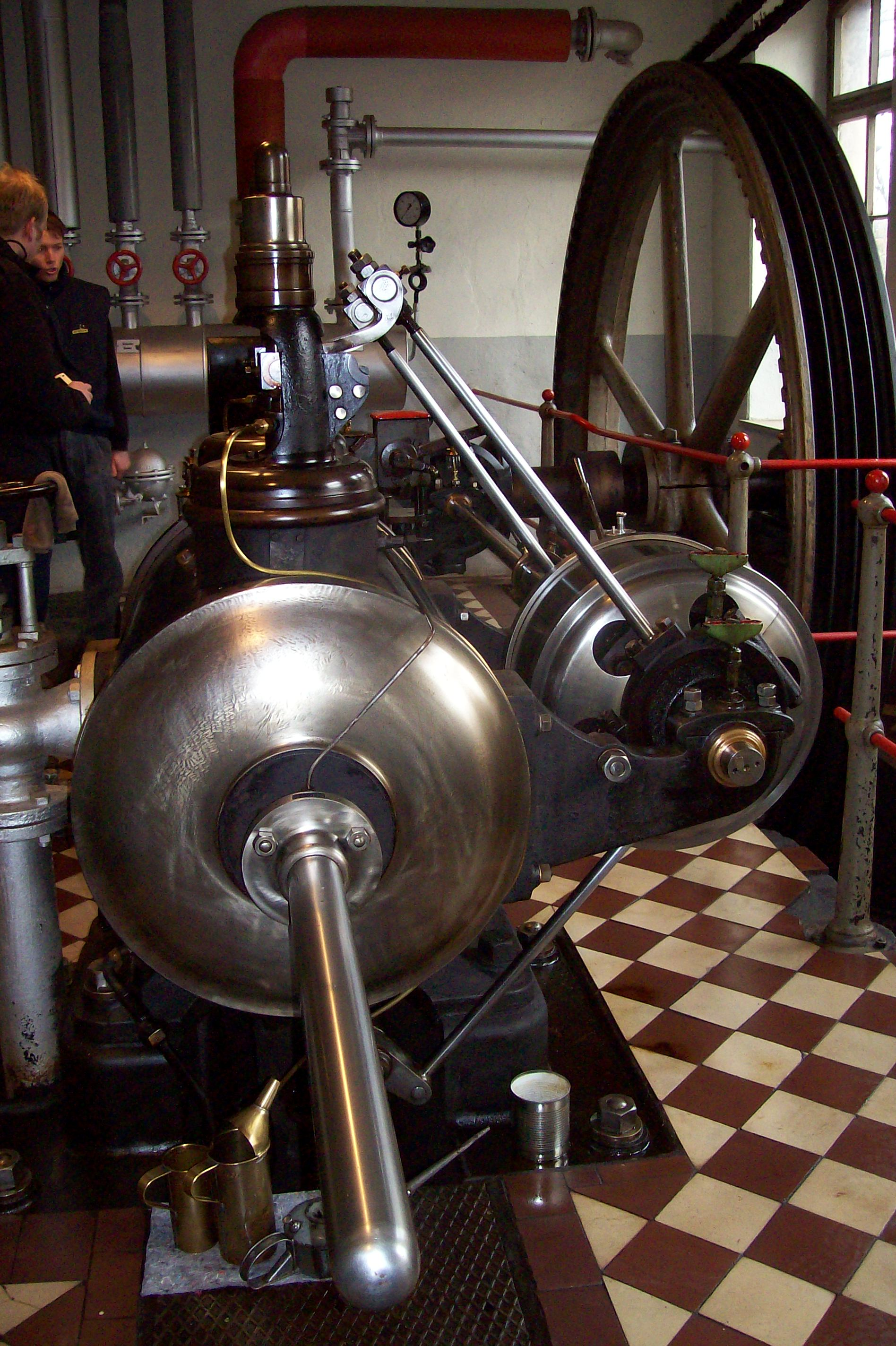 Dampfmschine Wilsdruff, Fabrikstraße 2